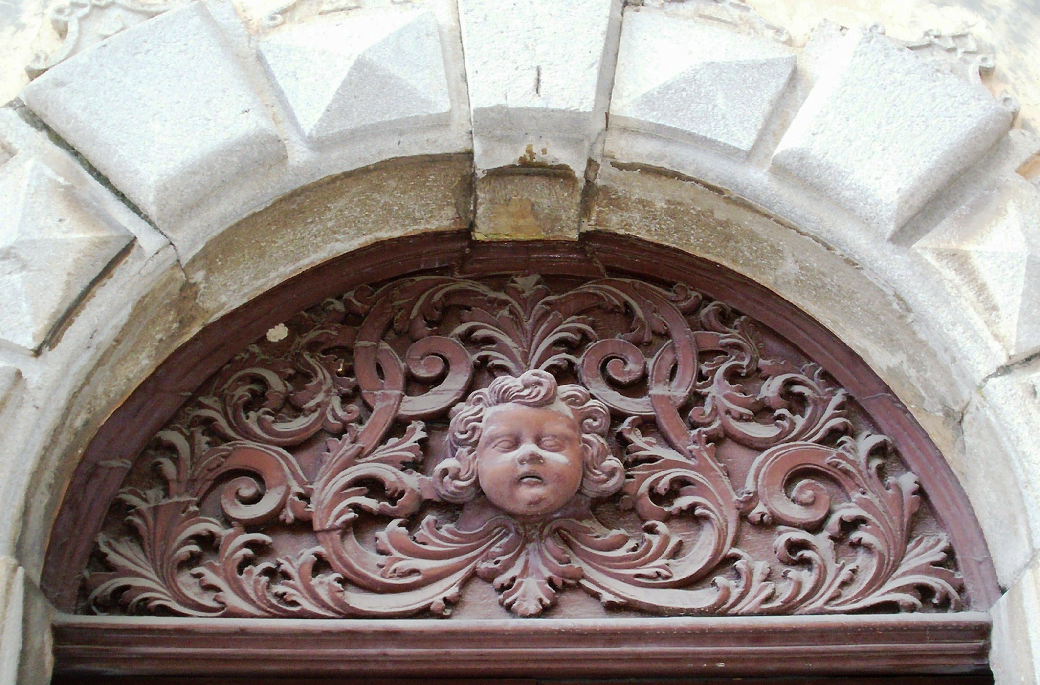 particolare del mascherone di pal. Carizza